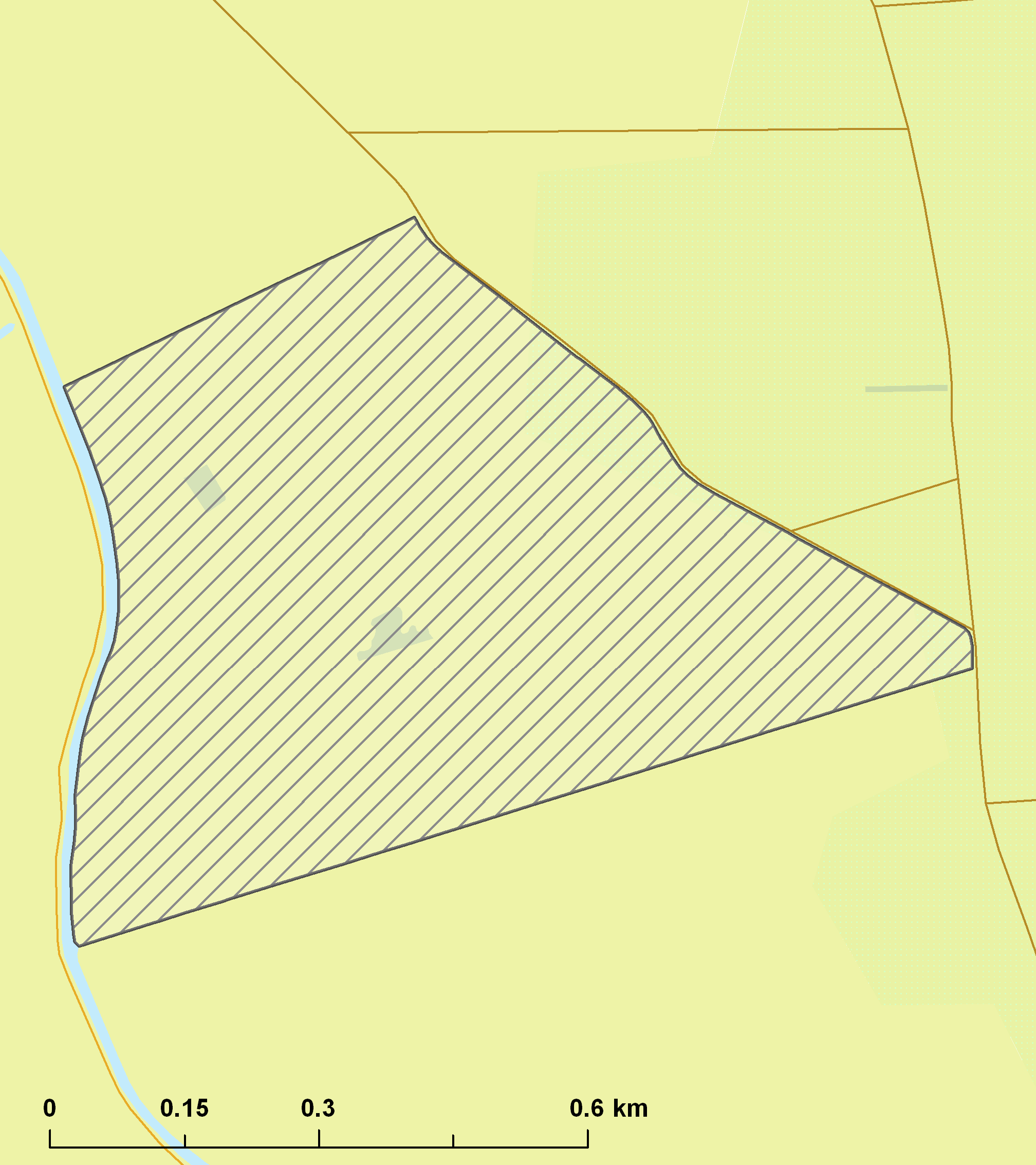 Natura2000 - Binnenveld.png